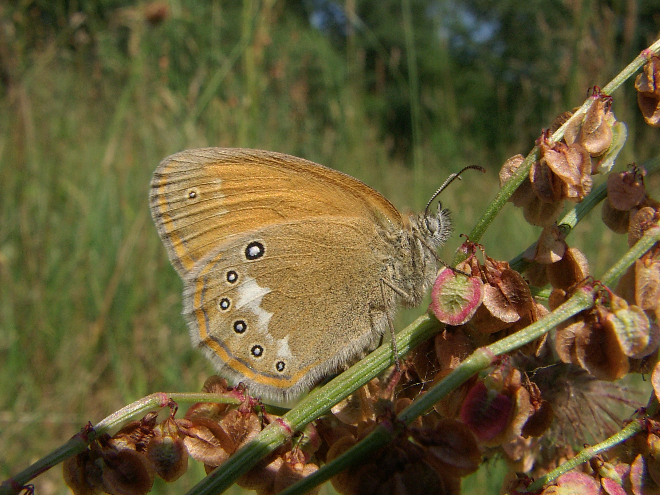 Coenonympha glycerion Strzępotek glicerion